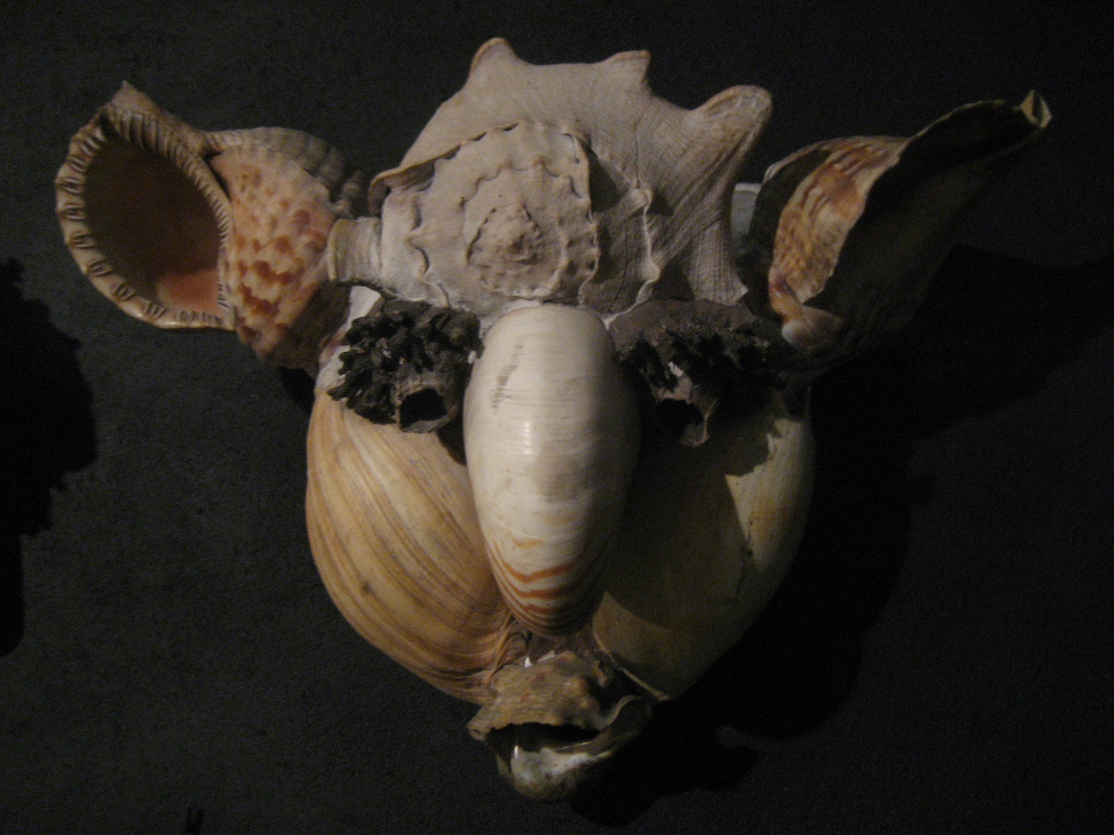 La Collection de l'Art Brut: Pascal-Désir Maisonneuve's Sea Shell Mask